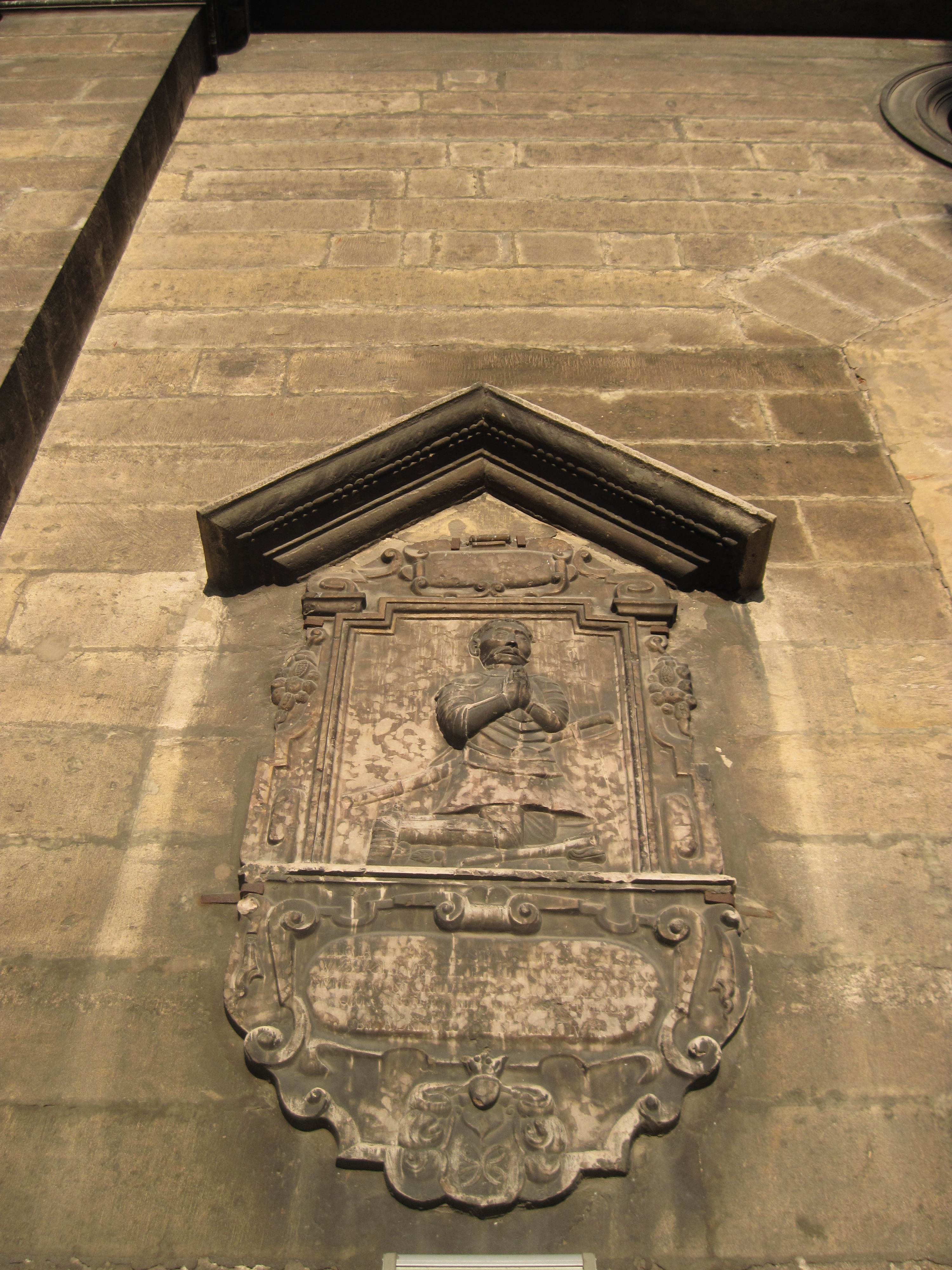 Дошка Станіславу Вижицкому на стіні церкви Андрія (костелу бернардинців), Львів